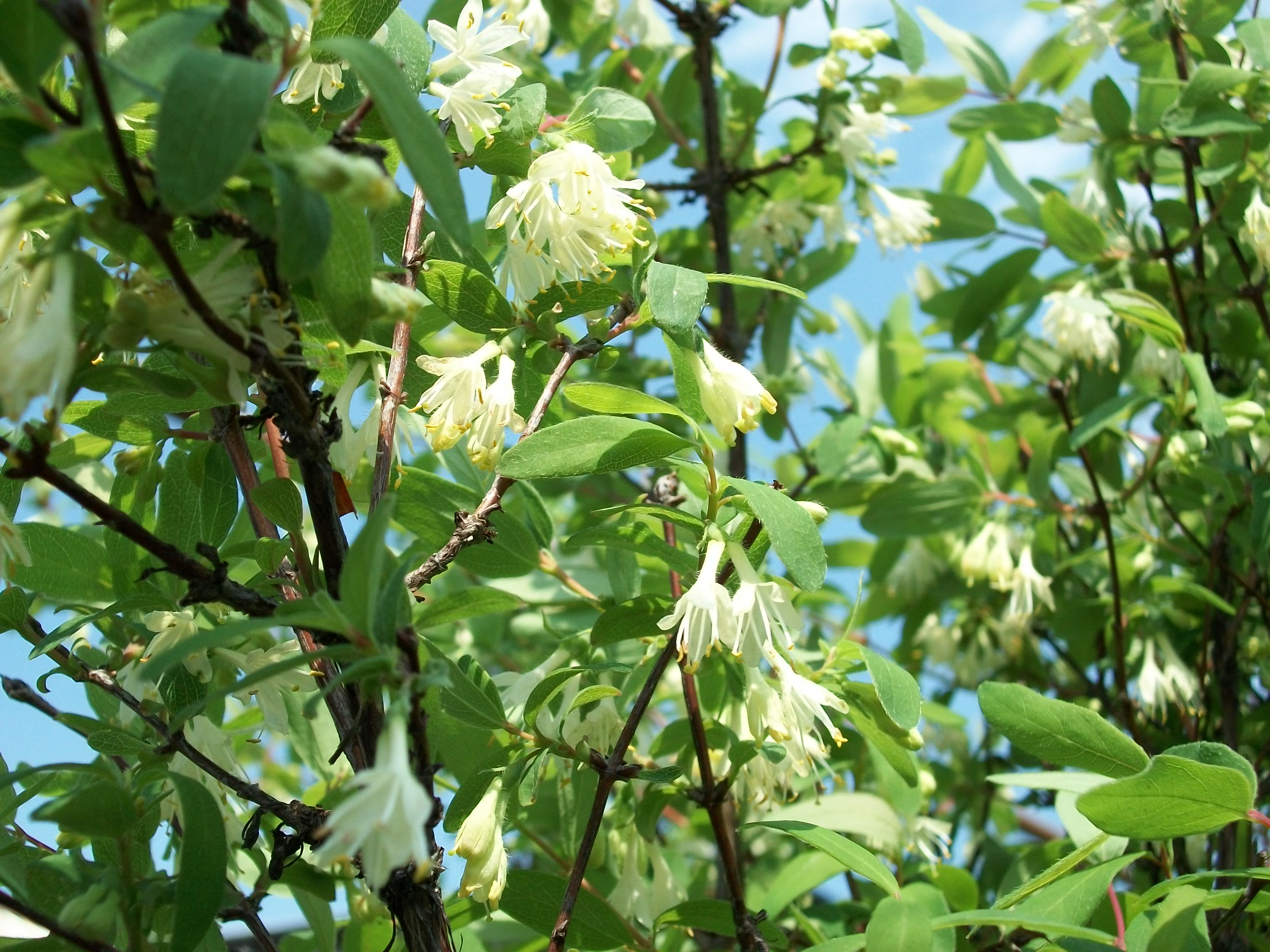 Цветущая садовая жимолость